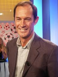 Giorgio Micheletti